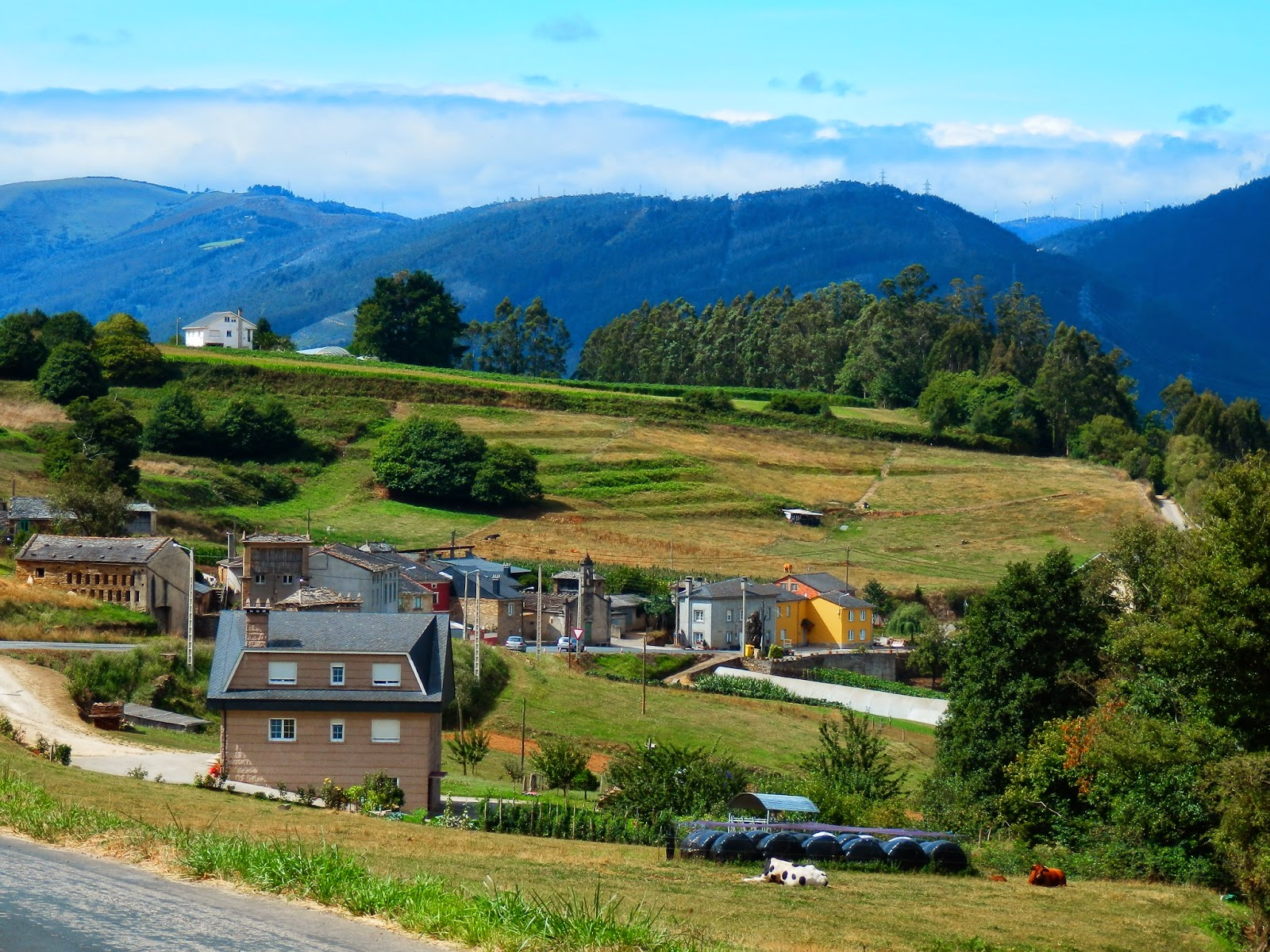 Vista do lugar de Grobe coa capela de Guadalupe no medio, parroquia de Vilamor, concello de Mondoñedo, España